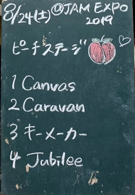 amiinAセトリボード